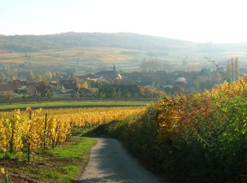 Le village de BERGBIETEN (Grand Cru Altenberg).